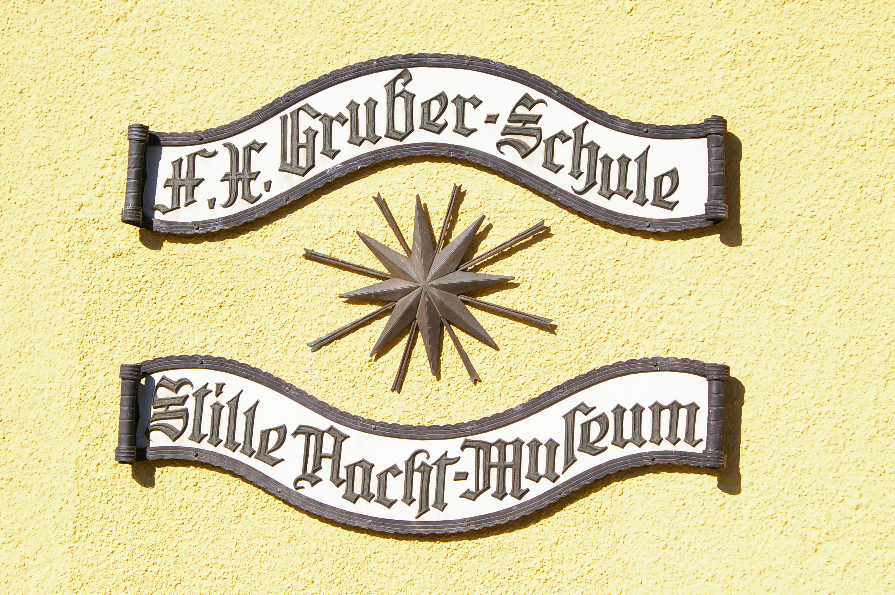 In diesem Gebäude unterrichtete Franz Xaver Gruber.Das Gebäude ist historisch.